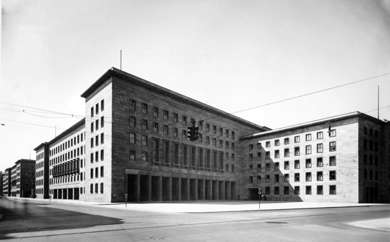 Berlin Reichsluftfahrtministerium Leipziger-Ecke Wilhelmstrasse. Dezember 1938